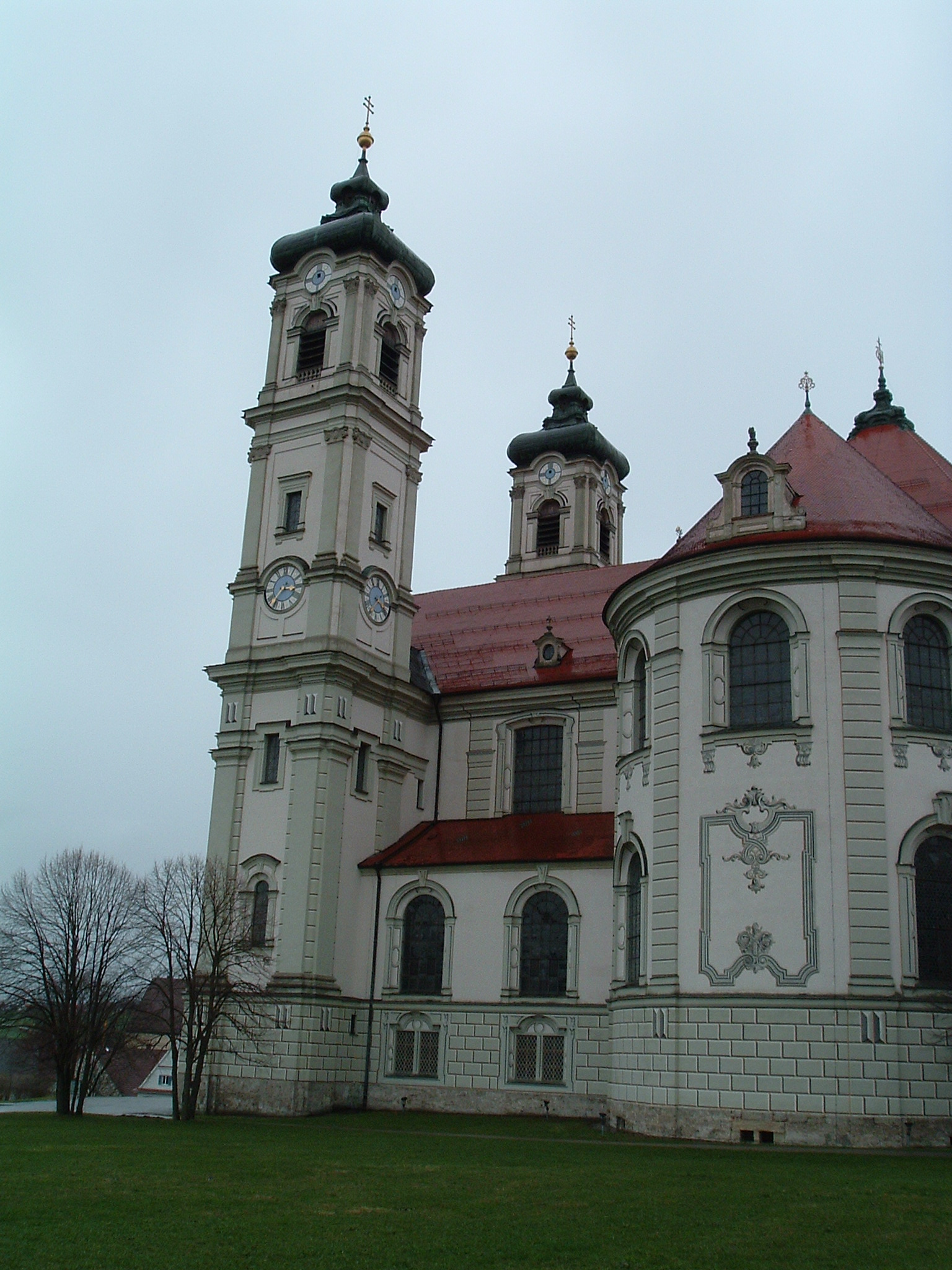 personnal picture (april 2004)